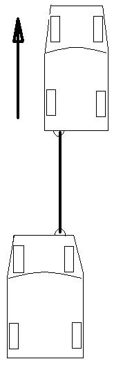 Eigene Skizze, jeder darf herzlich gern etwas besseres malen.